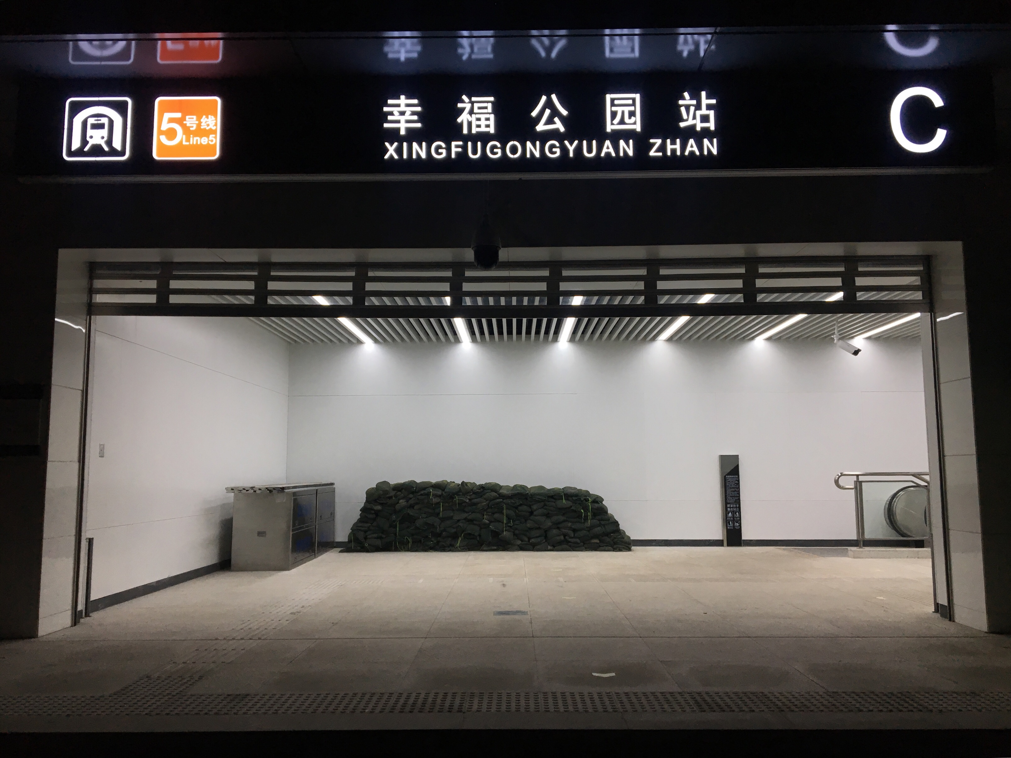 天津地铁幸福公园站C出入口